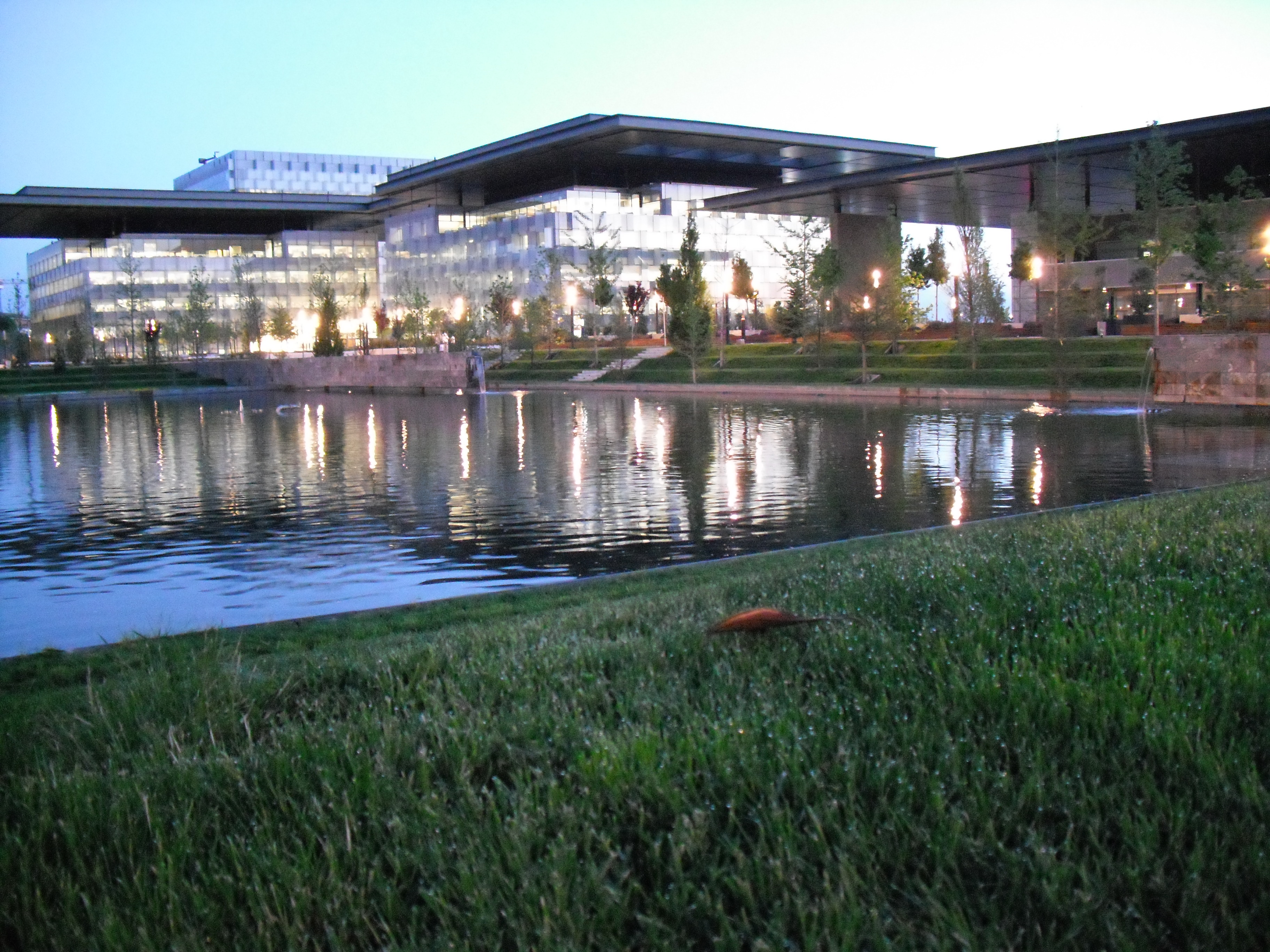 Distrito C Madrid Comunidad de Madrid España